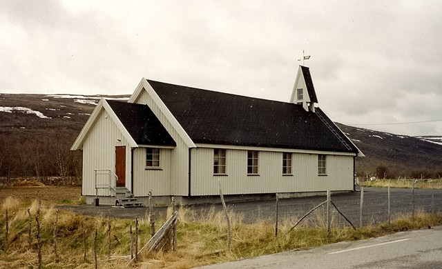 Sirbma kapell